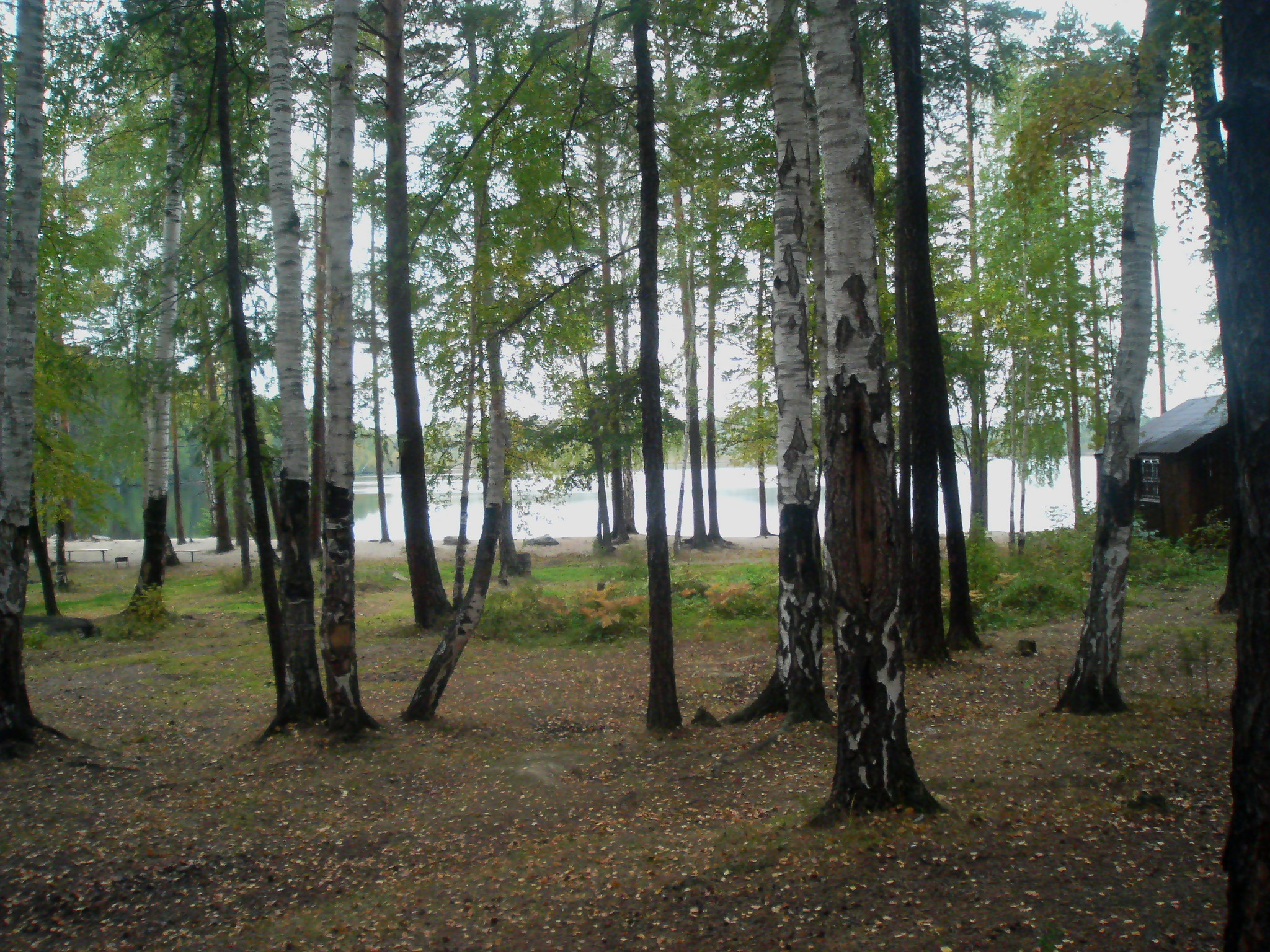 Песчаное озеро - восточный берег